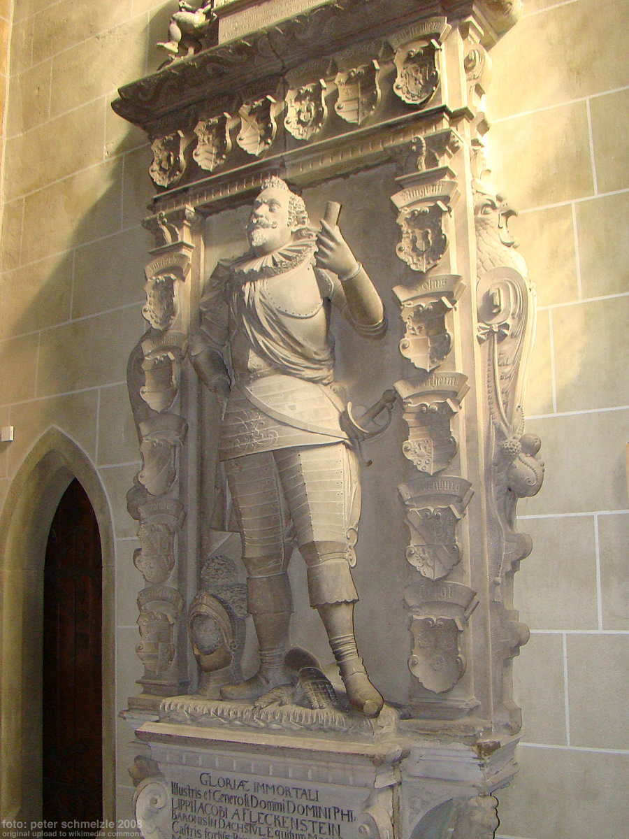 Fleckenstein-Epitaph in der Stadtkirche Bad Wimpfen